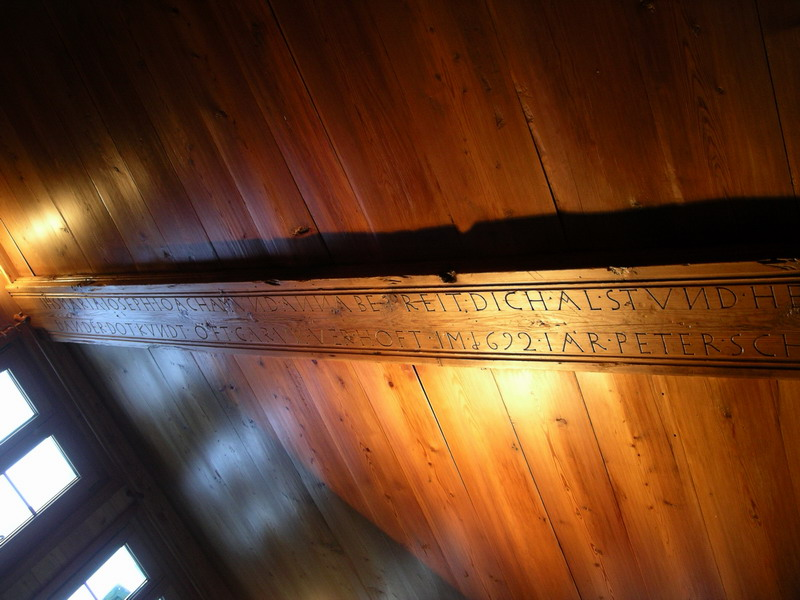 Dielbaum (Tillbööm)